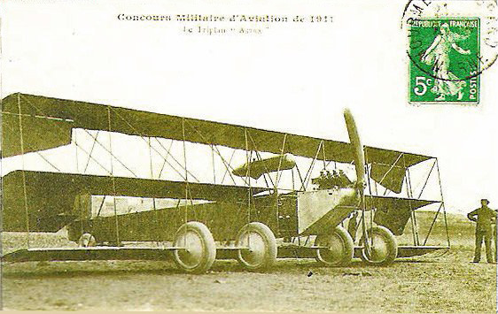 une carte postale de France d'avant 1930. Triplan Astra lors du concours militaire Champagne 1911.